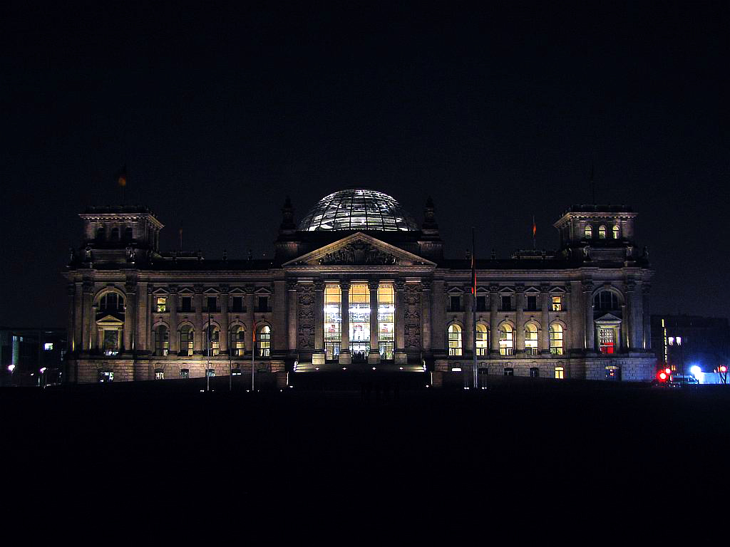 Berlin Nachtfoto Deutscher Bundestag Reichtstagsgebäude Bundesrepublik Deutschland - reconstruction architect Norman Foster (ursprünglicher Entwurf des Architekten Paul Wallot Foto 2011 Wolfgang Pehlemann IMG_0635.jpg